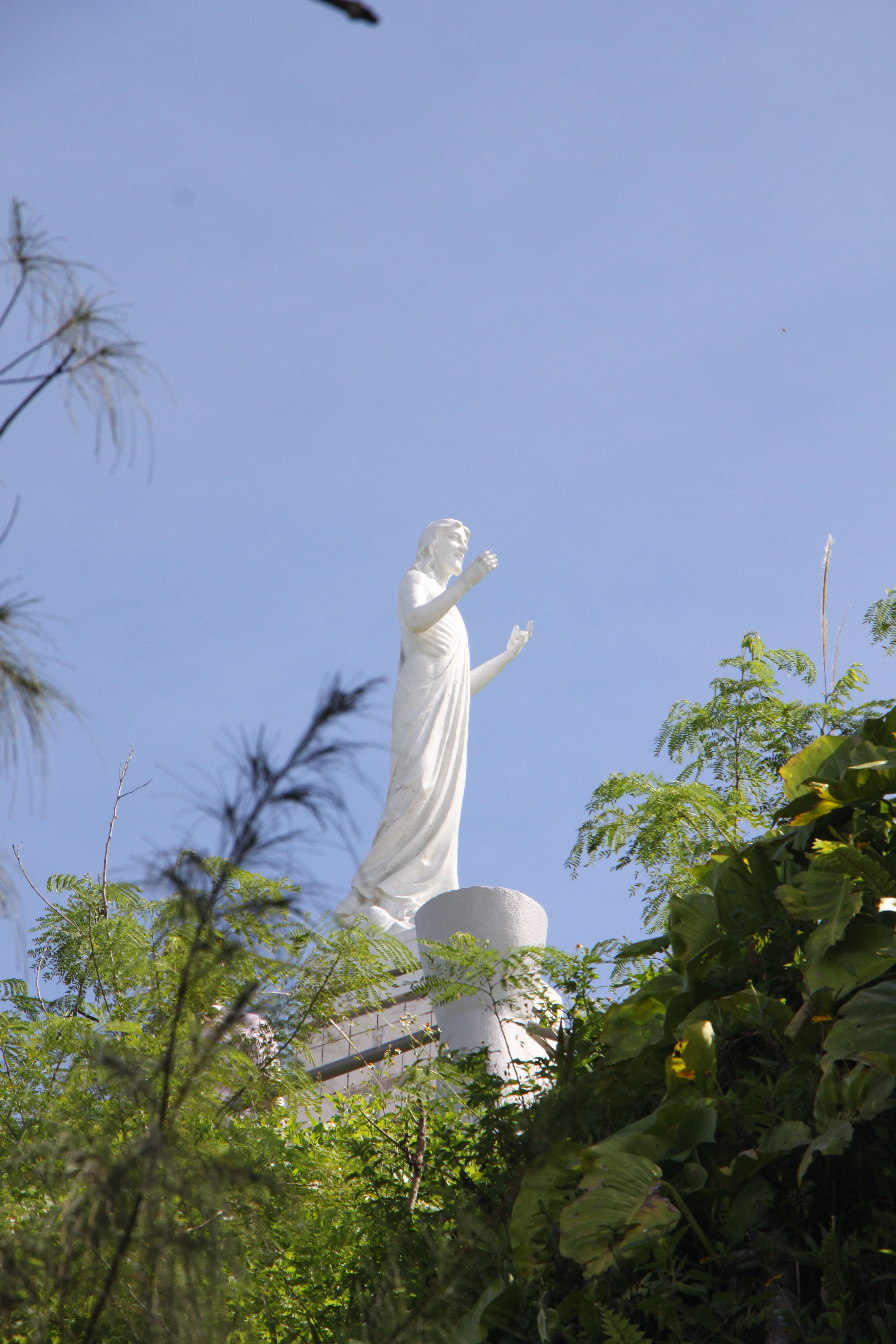 中文（中国大陆）: 塞班岛塔波查山上的耶稣像